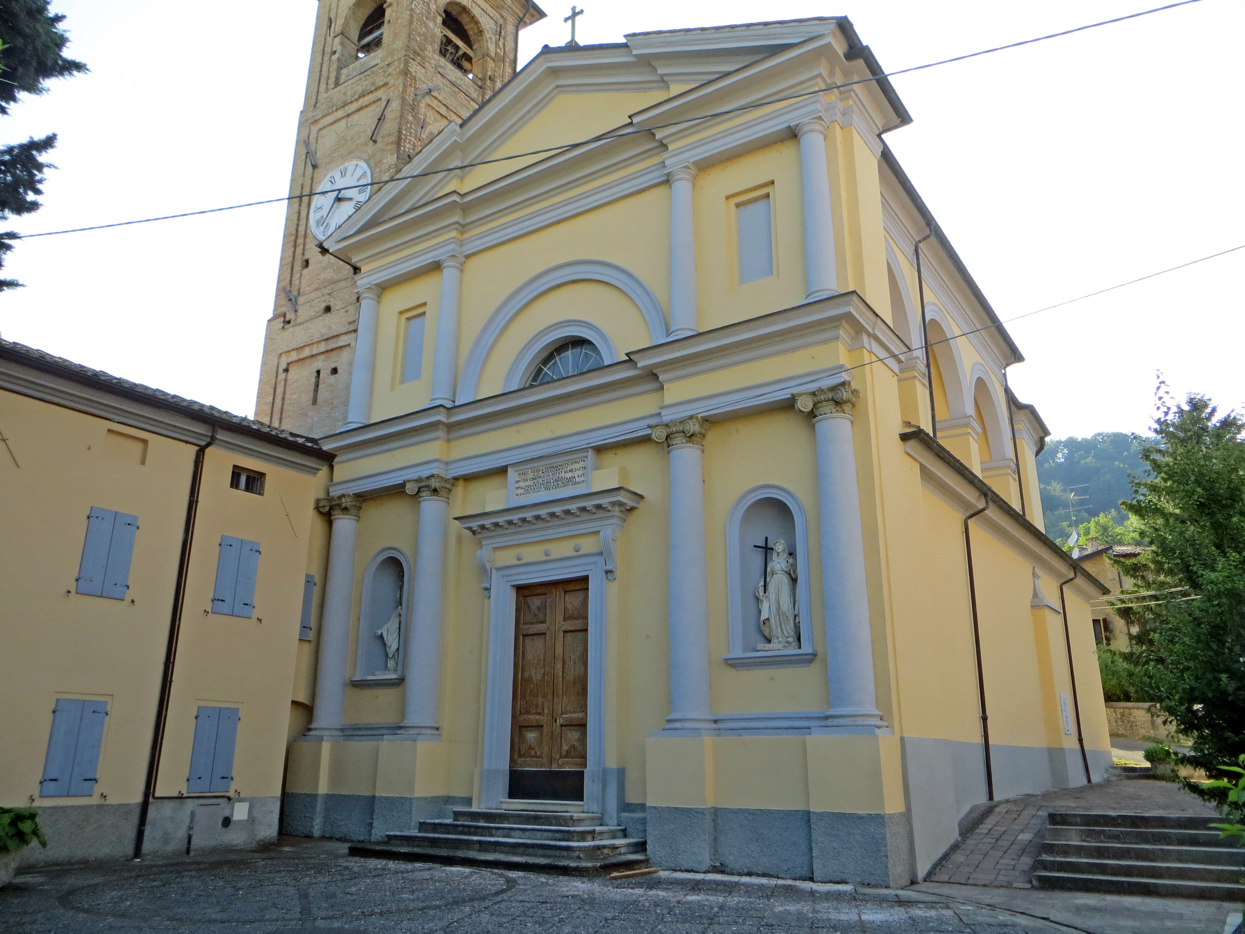 Chiesa di San Vitale (San Vitale Baganza, Sala Baganza) - facciata e lato nord This is a photo of a monument which is part of cultural heritage of Italy.